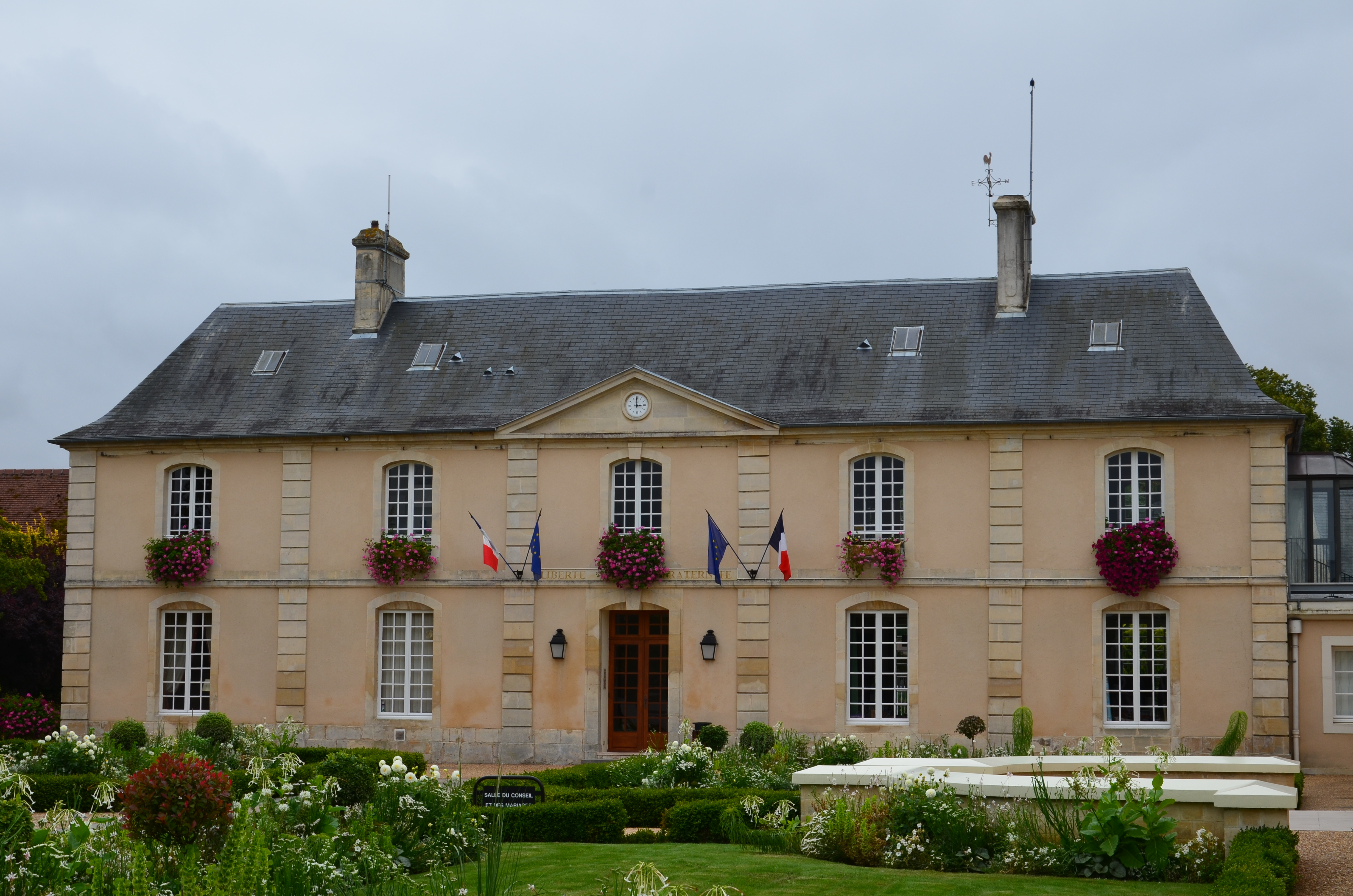 Vue de la façade nord de la mairie de Cormelles-le-Royal.